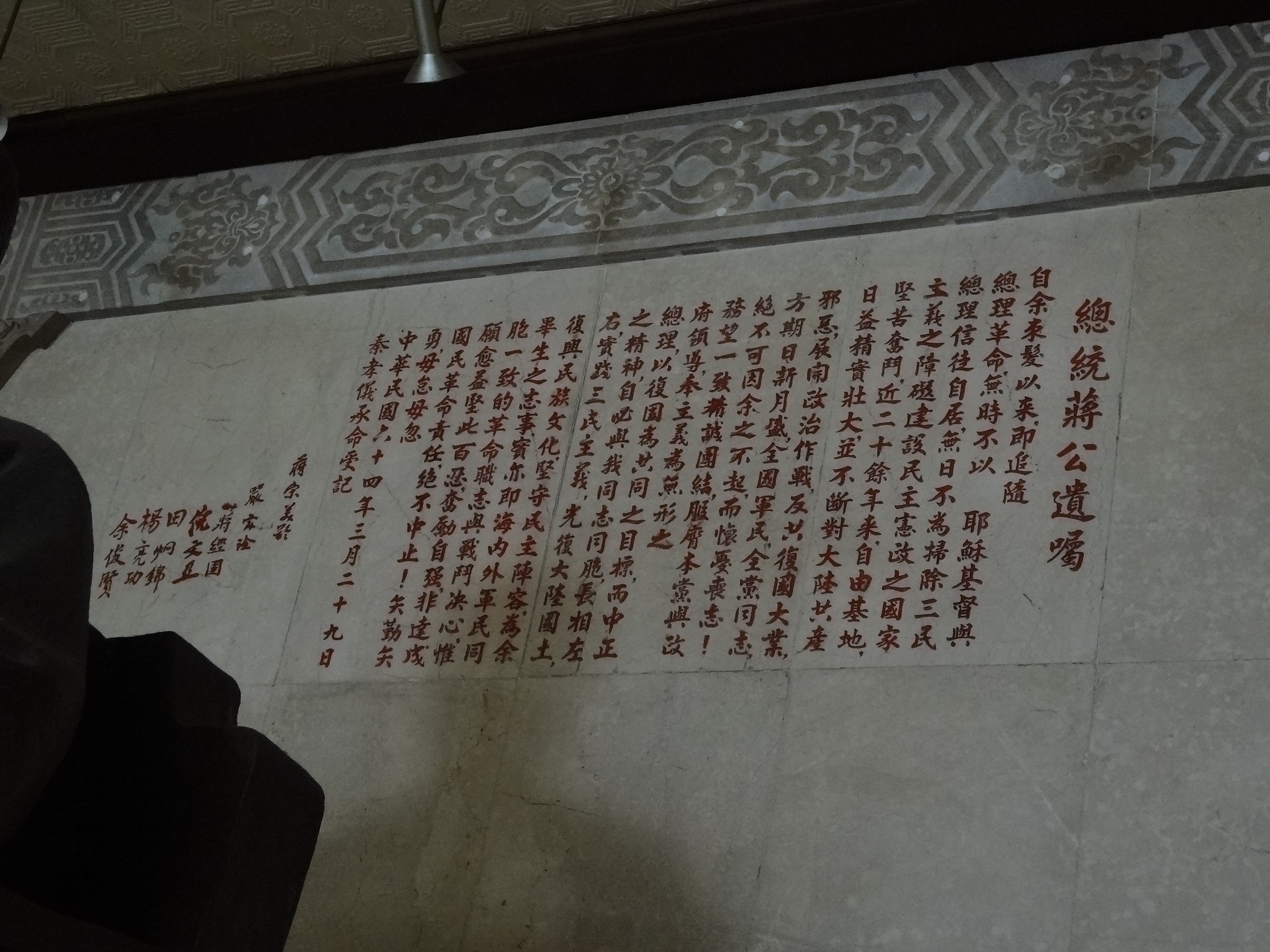 基隆文化中心一樓大廳牆面刻的1975年3月29日秦孝儀書〈總統蔣公遺囑〉，2015年與前方蔣中正銅像一同被基隆市政府無預警撤除。